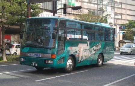 つくしの観光バスの貸切車両。